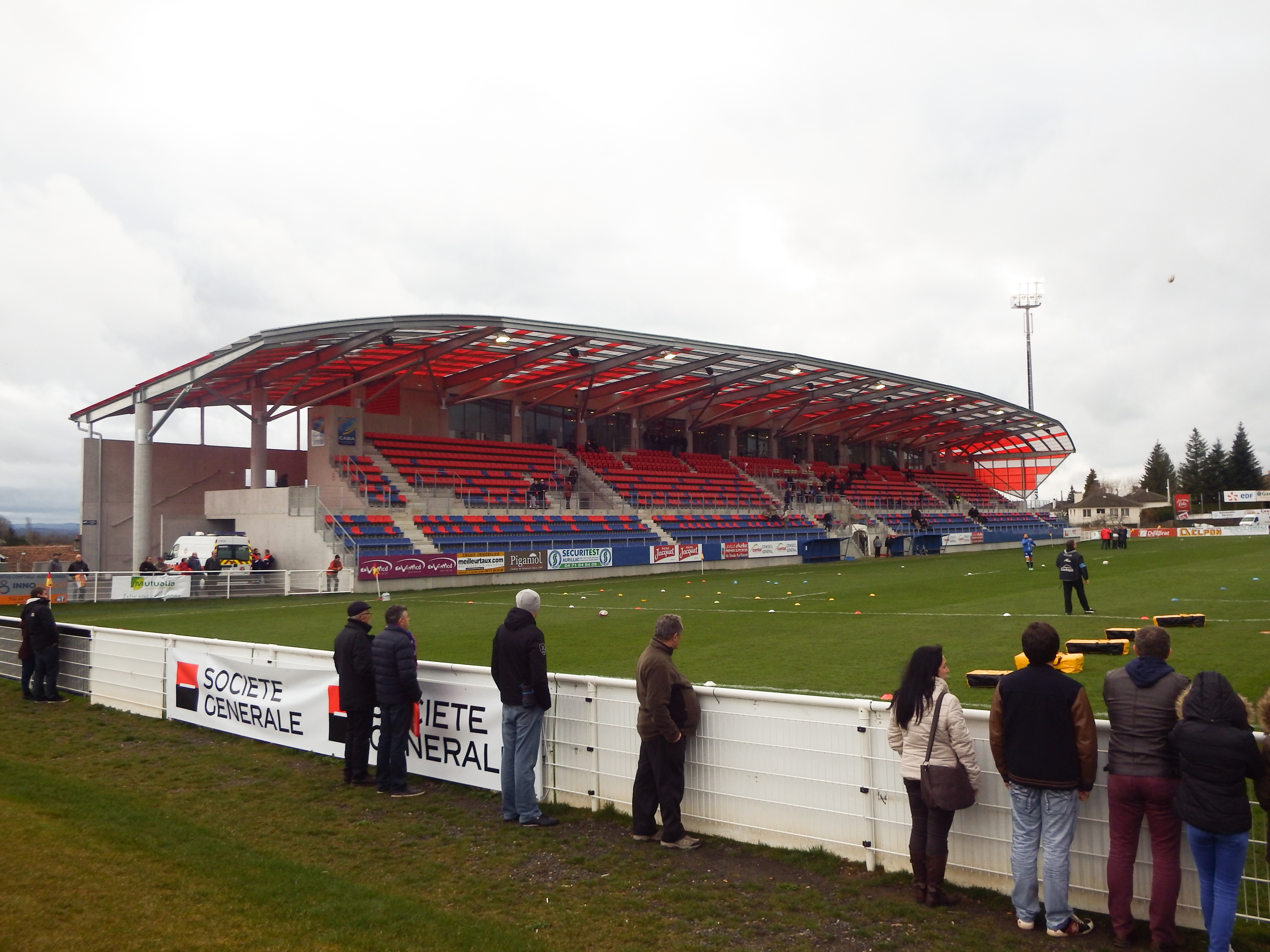 28 March 2015, Stade Jean-Alric. Match between: Stade aurillacois — US Dax